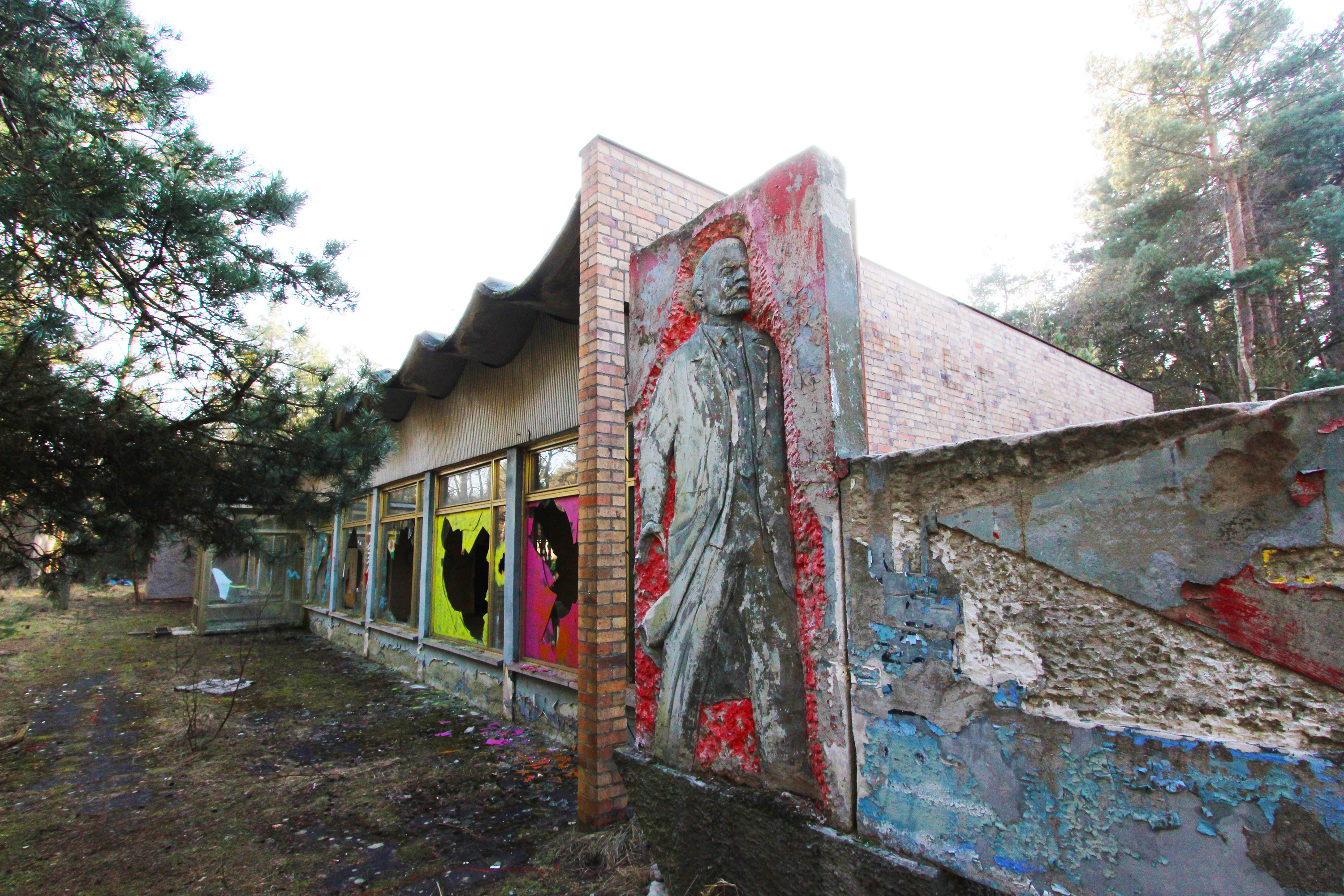 Lenin-Relief neben Café (links) - Ehemaliges GSSD-Gelände in Vogelsang, 2015